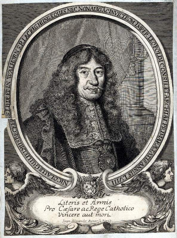 Nicolaus Wilhelm Beckers (etwa 1630-1705)